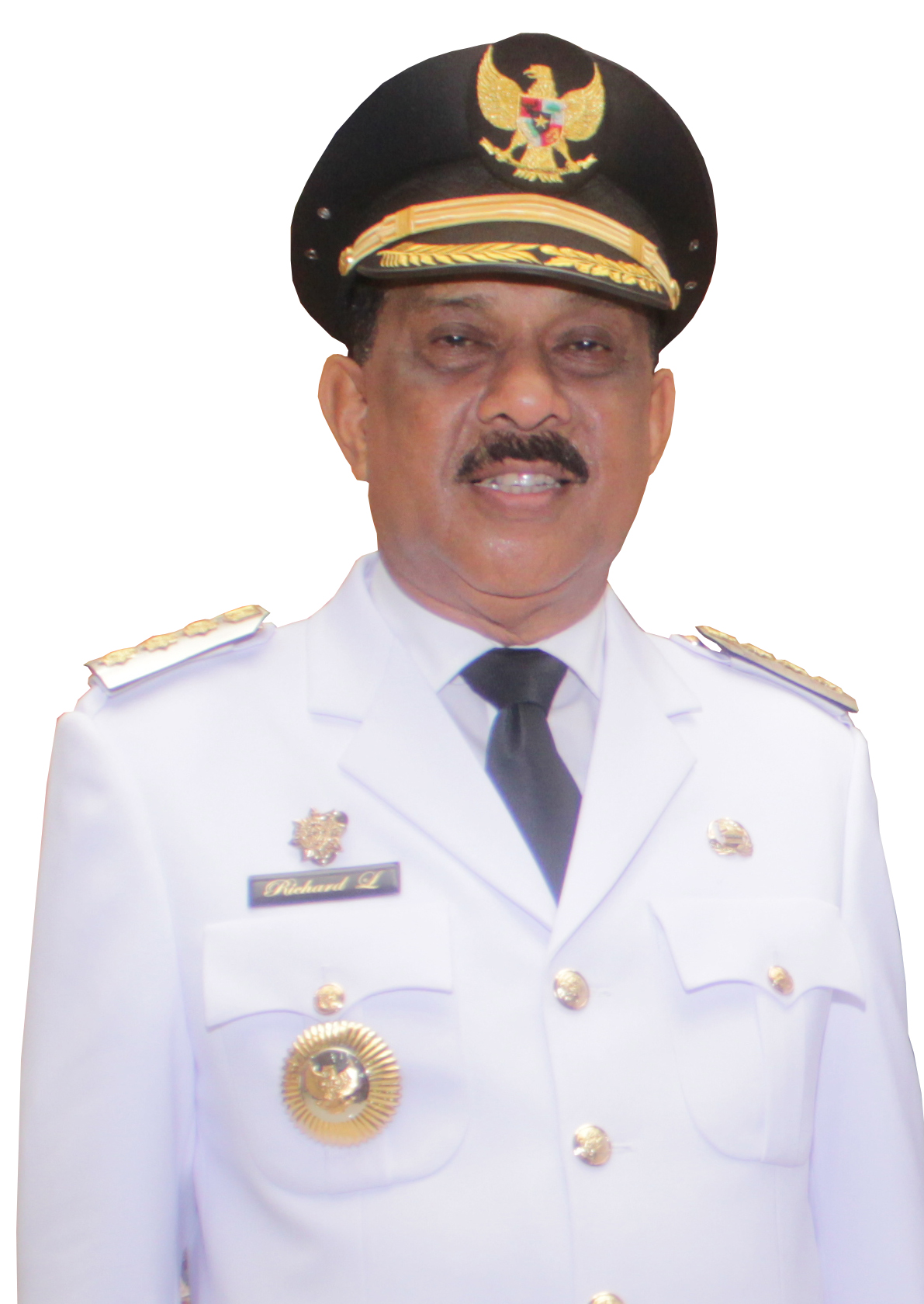 Richard Louhenapessy, wali kota Ambon periode 2012–2017 dan 2017–2022